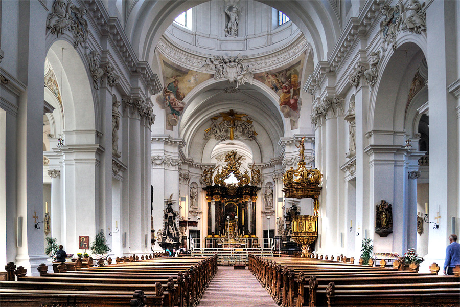 Fulda, Dom